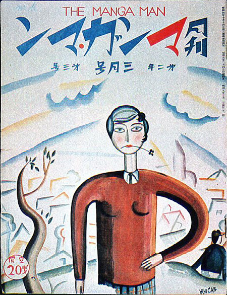 『月刊マンガ・マン』、第2巻第3号、東京漫画新聞社、1930年3月